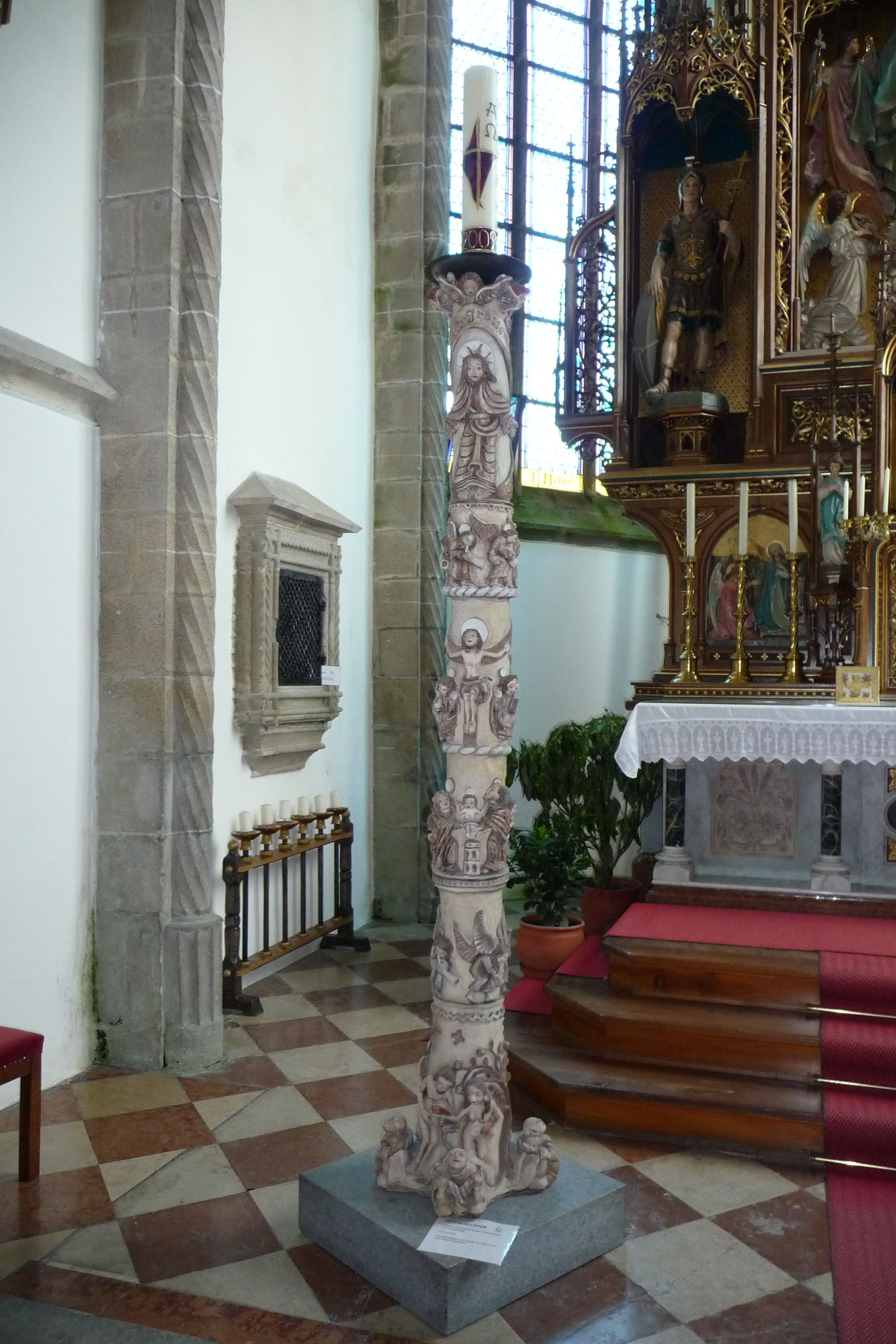 Kerzenhalter der Pfarrkirche Hirschbach Mkr.